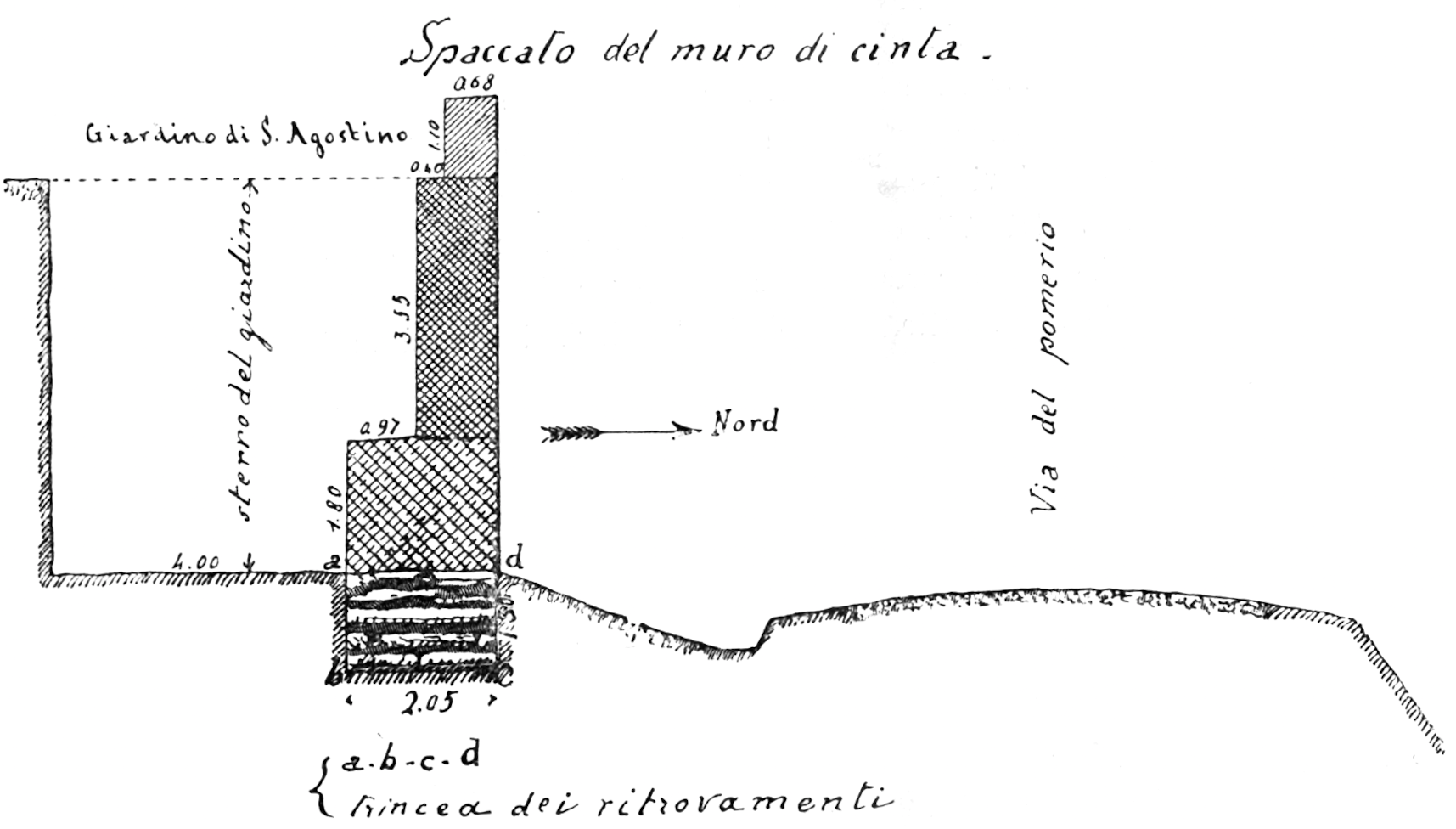 Immagini dei ritrovamenti nei pressi del convento di S. Agostino di Benevento nel 1903, perlopiù pertinenti al tempio di Iside della città romana. Tratto da A. Meomartini, O. Marucchi e L. Savignoni, "Benevento", in "Notizie degli scavi di antichità", vol. 1, 1904, pp. 107-131